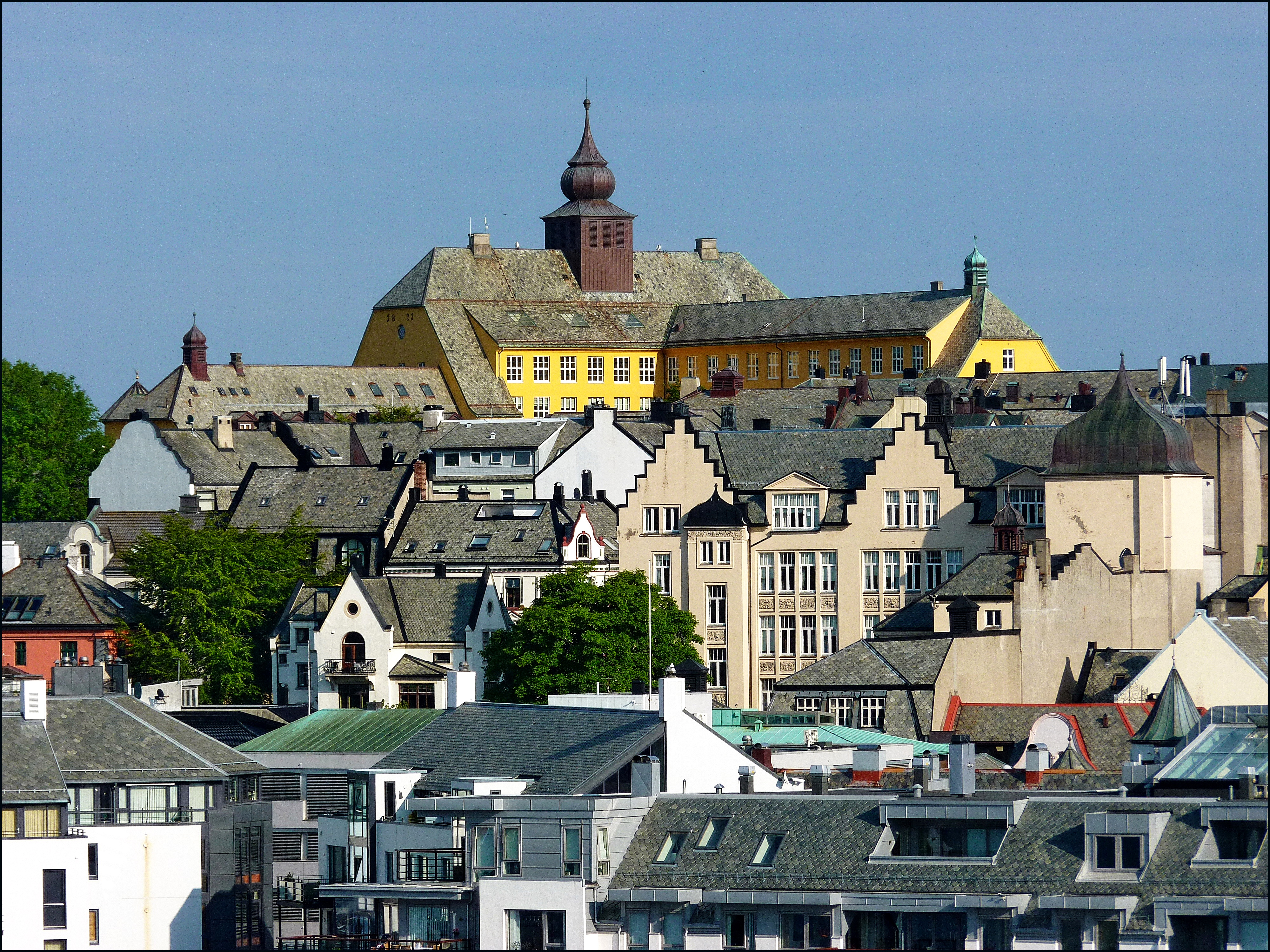 Ålesund